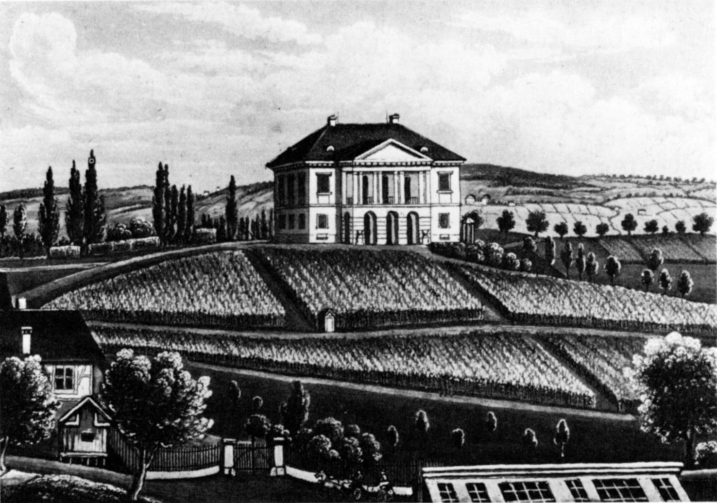 Villa Freudenberg in Zürich im 19. Jh. (vor 1887) 1822-25 von Heinrich Bodmer erbaut nach Plänen von Heinrich Kaspar Escher. 1954 zugunsten der Schulhausanlage Freudenberg abgerissen. Stich von Heinrich Siegfried nach einem Aquarell von Schmid